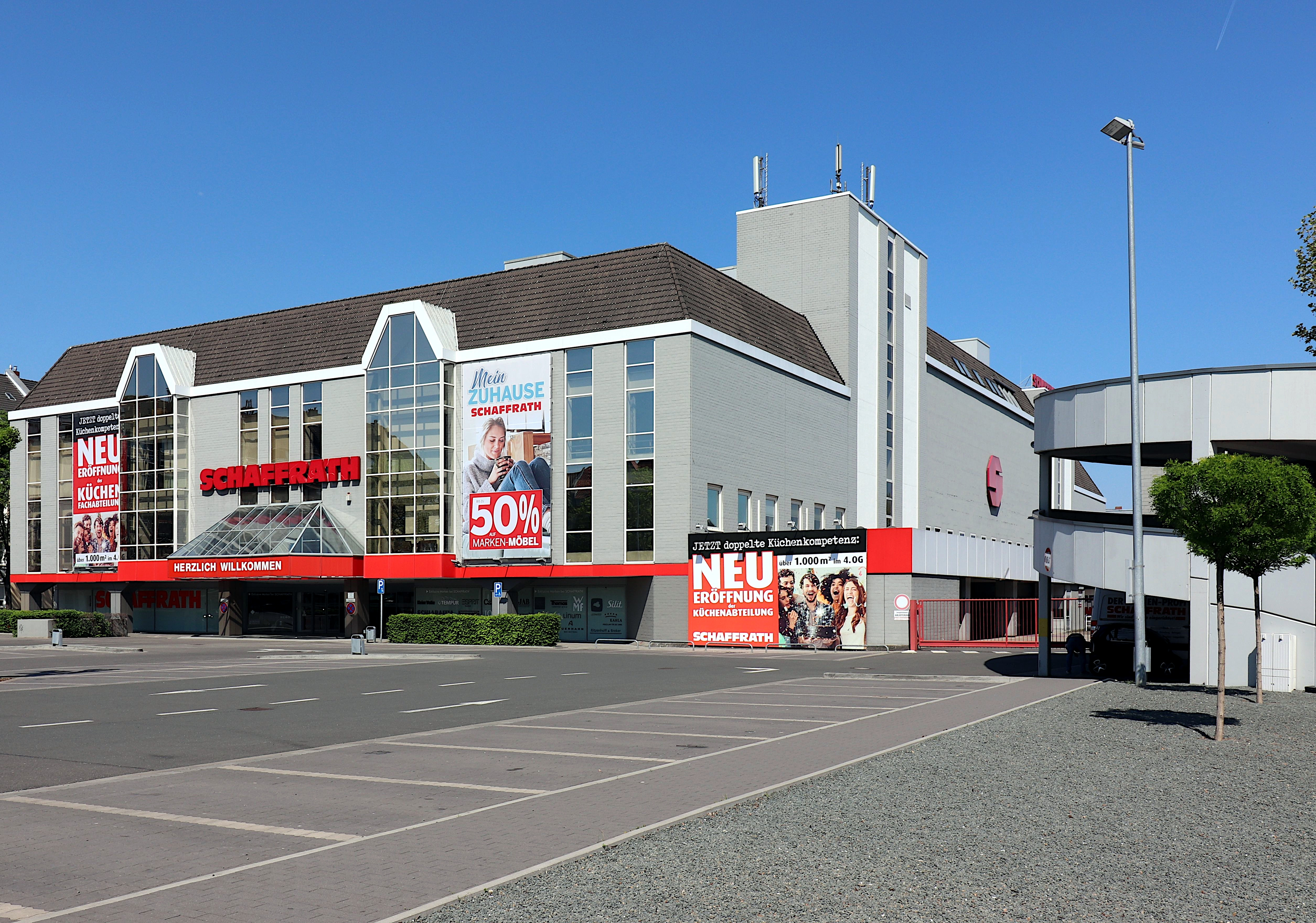 Möbelhaus Schaffrath in Düsseldorf-Bilk